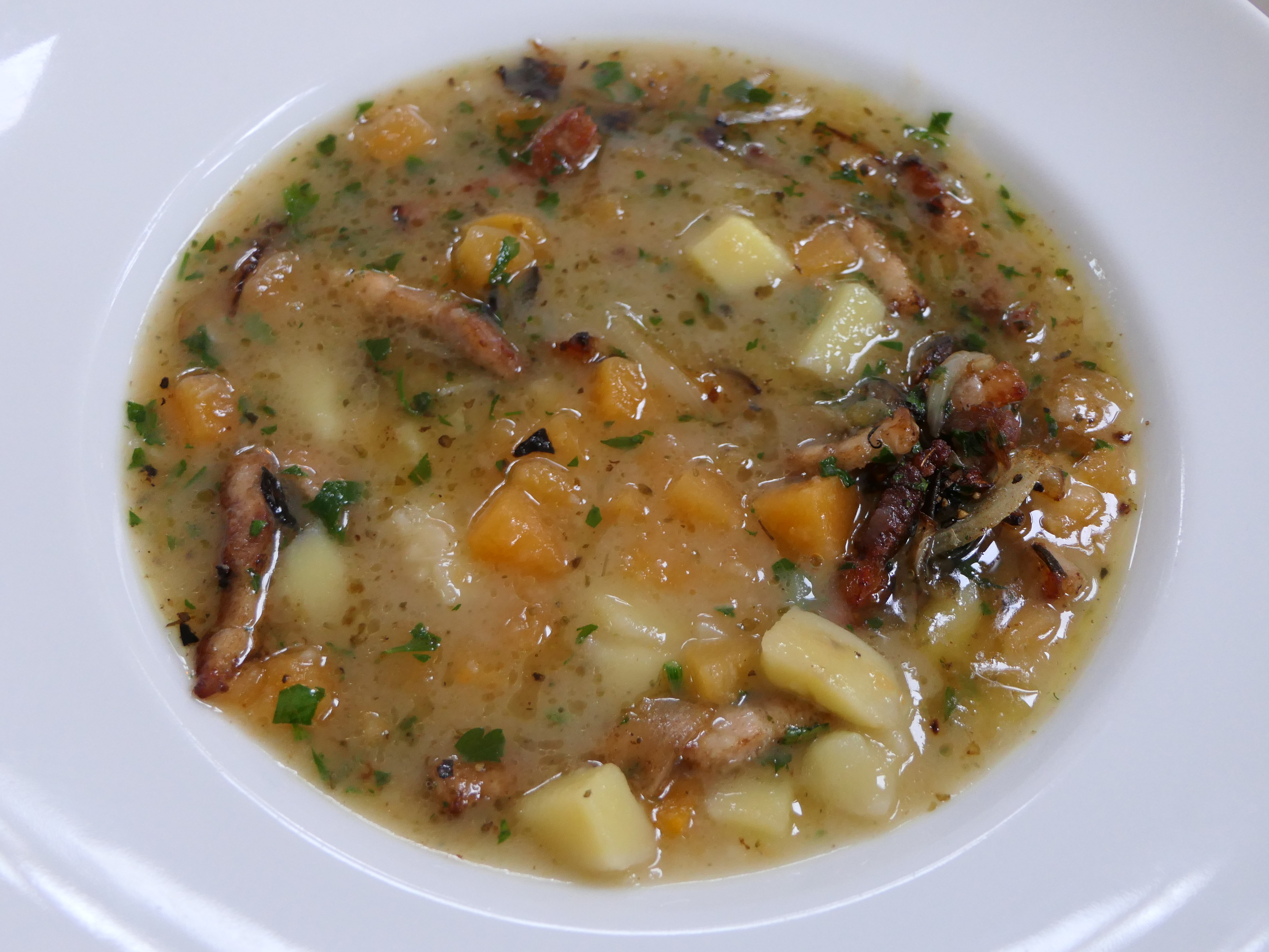 Steckrübeneintopf mit Gänsefleisch; Landhotel Gustav in Beelitz Heilstätten